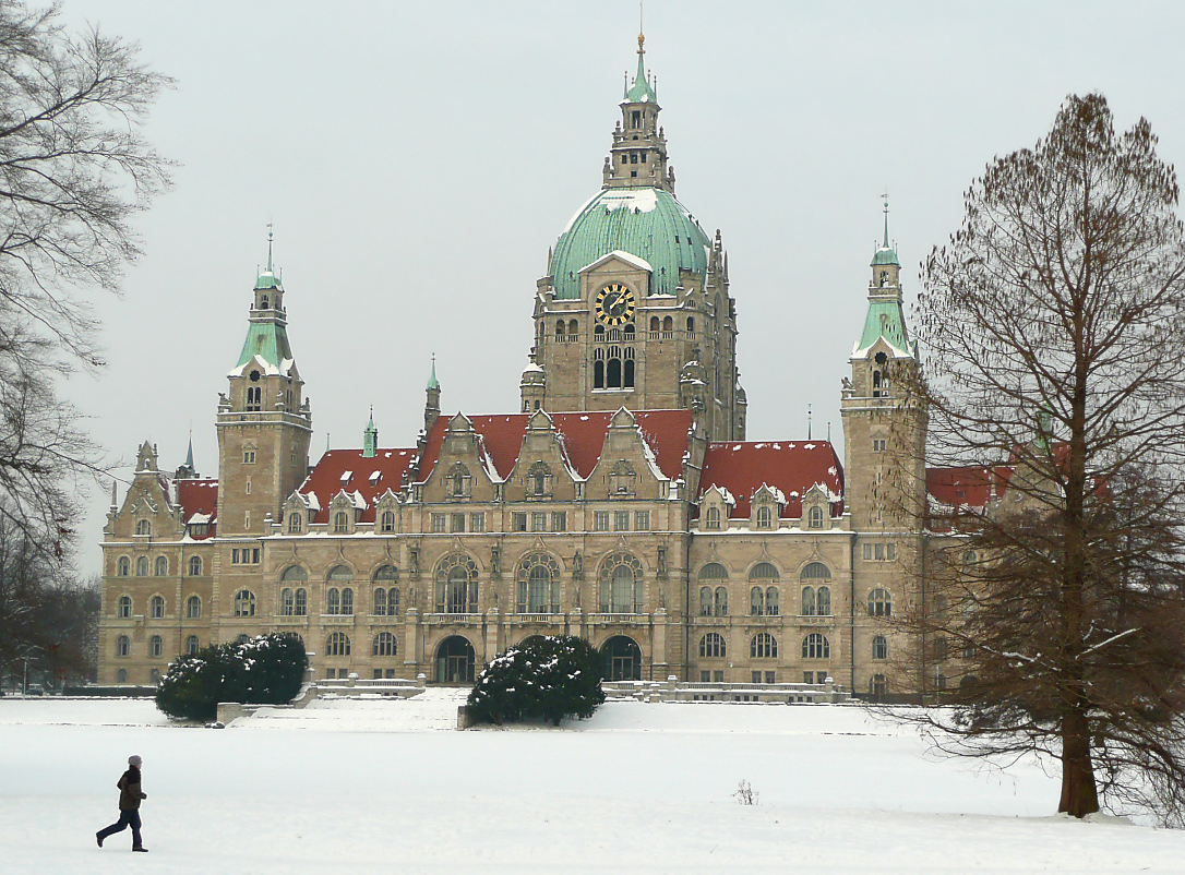 Zugefrorener Maschteich und Gartenfassade Neues Rathaus Hannover im Winter